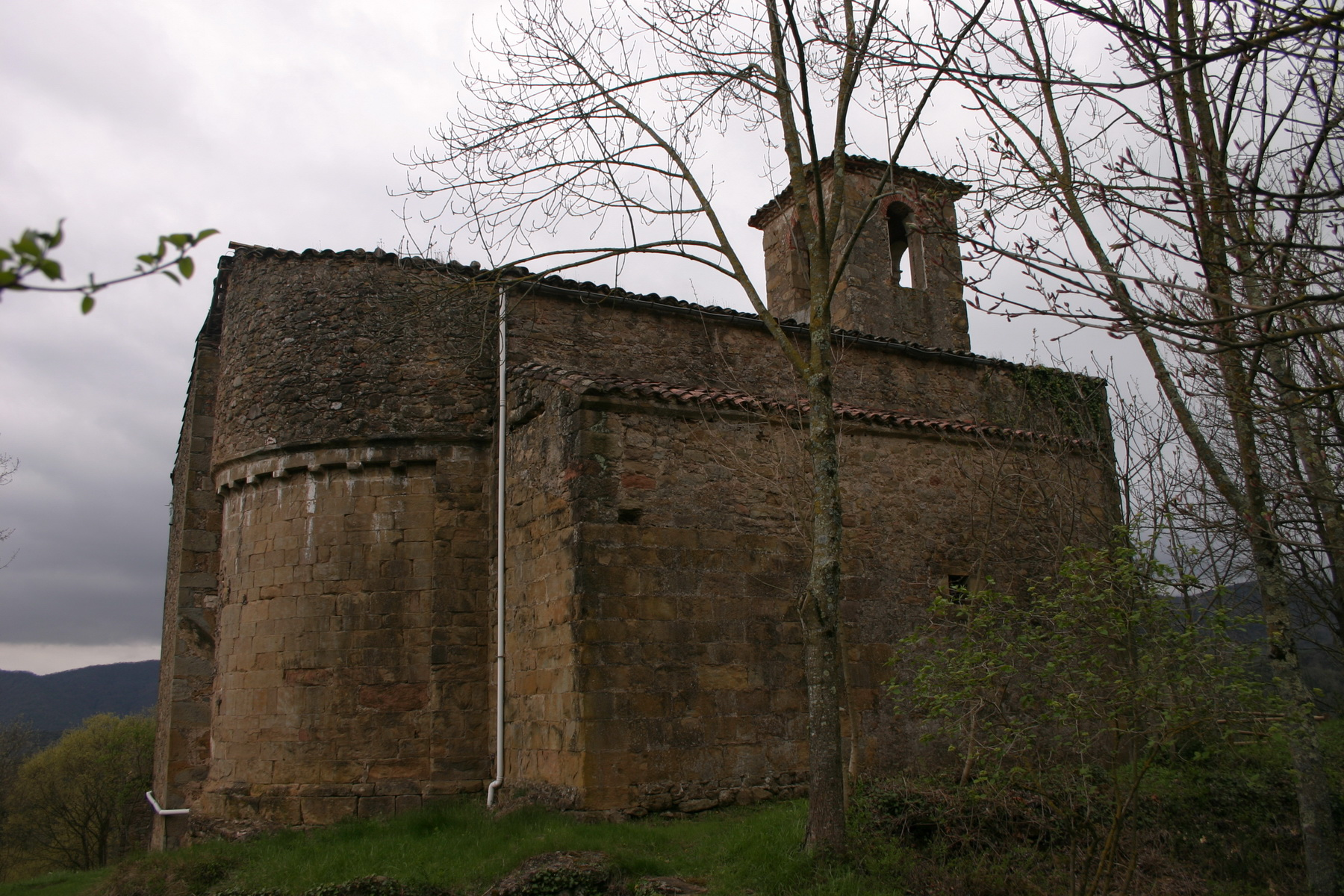 Església de Sant Martí del Clot (la Vall de Bianya)